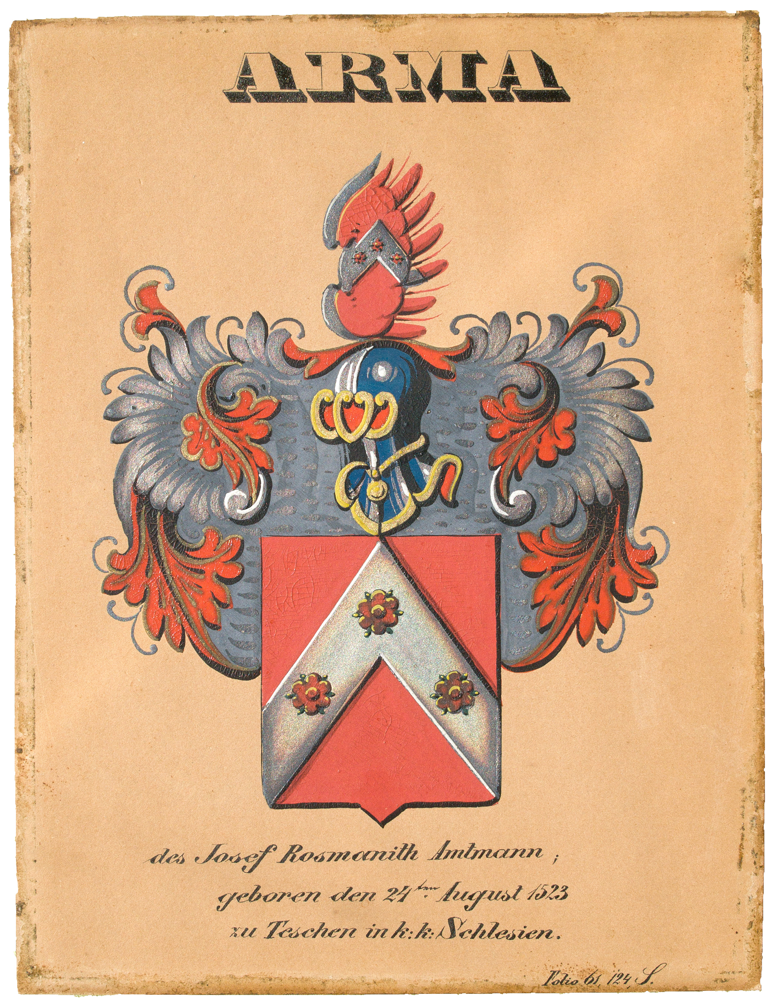 Familienwappen von 1523 der Familie Rosmanith